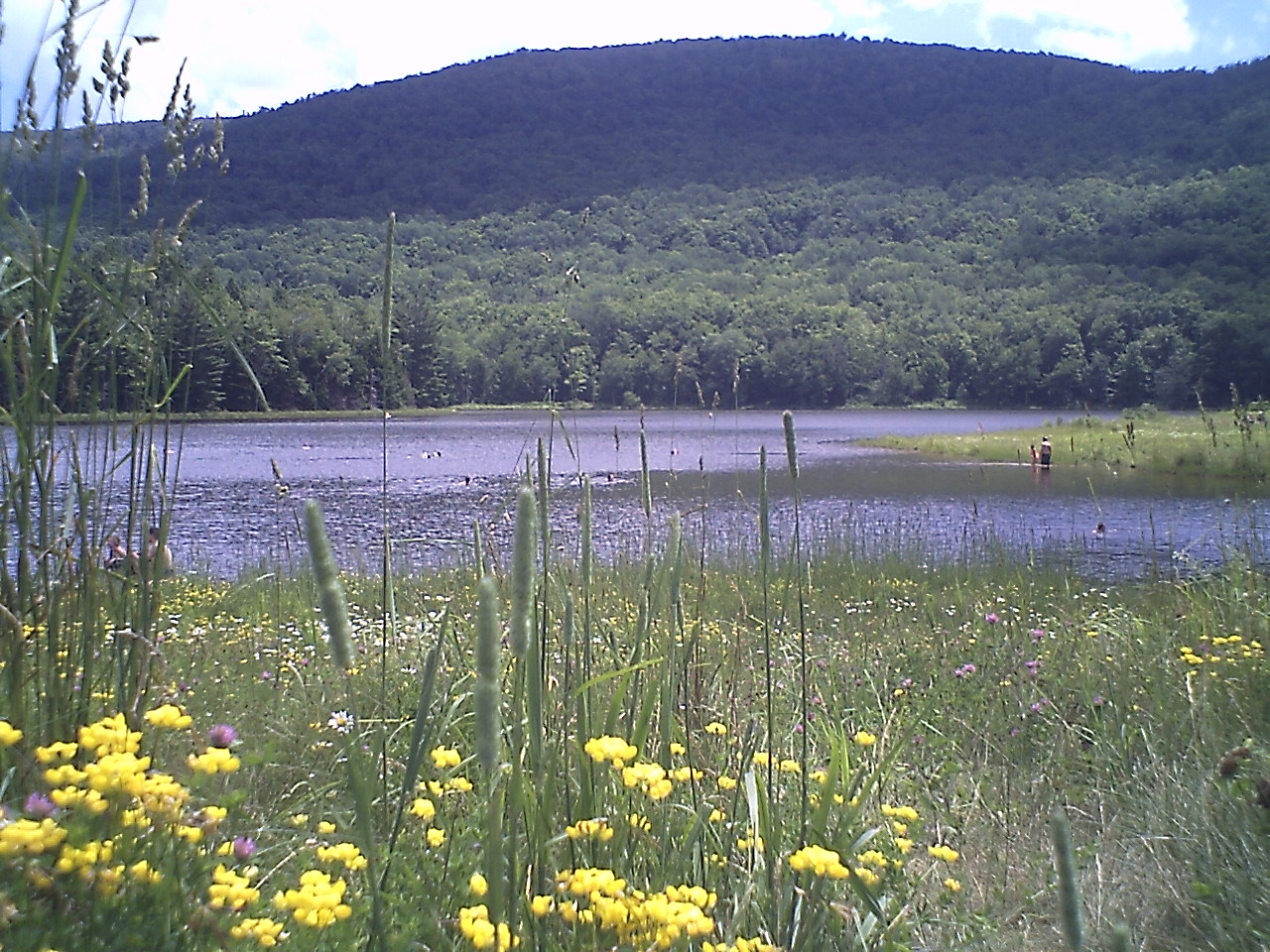 Colgate Lake, Catskills, NY